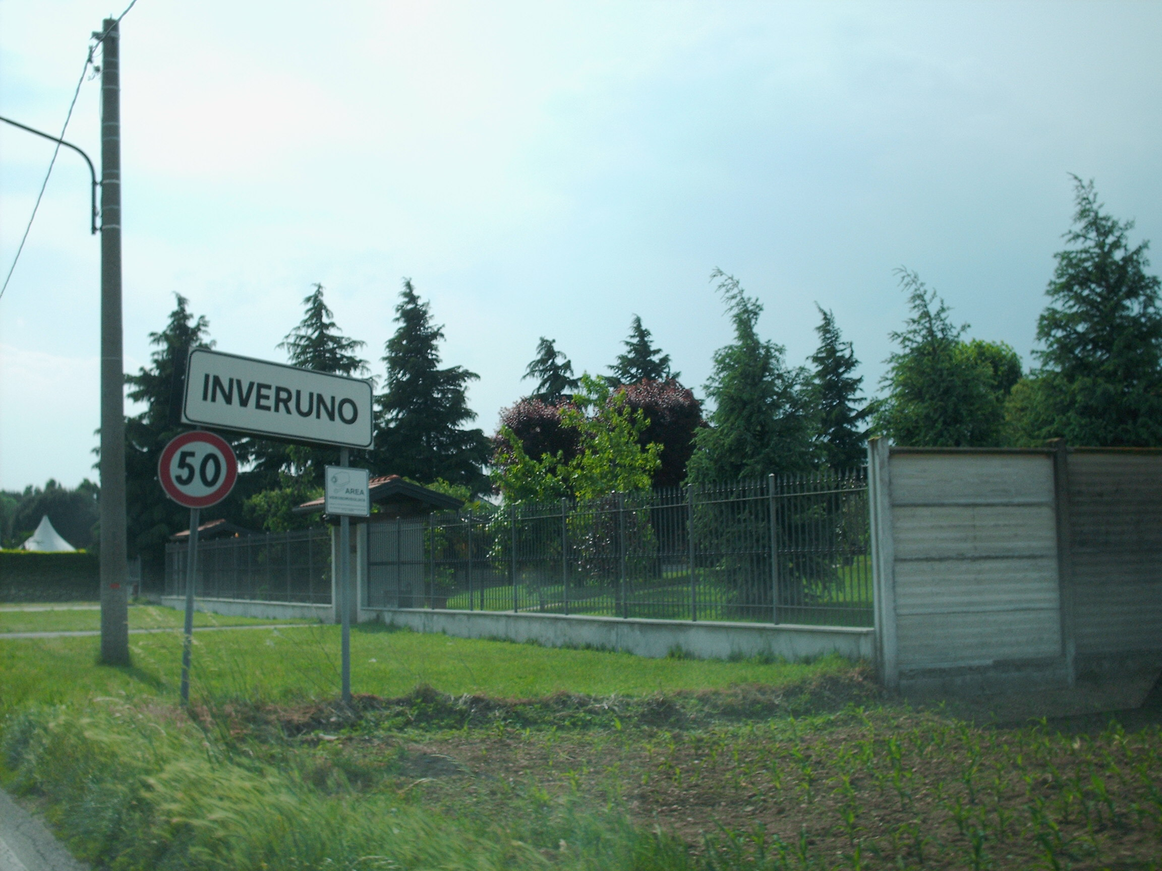 Entrata Inveruno arrivando da Casorezzo